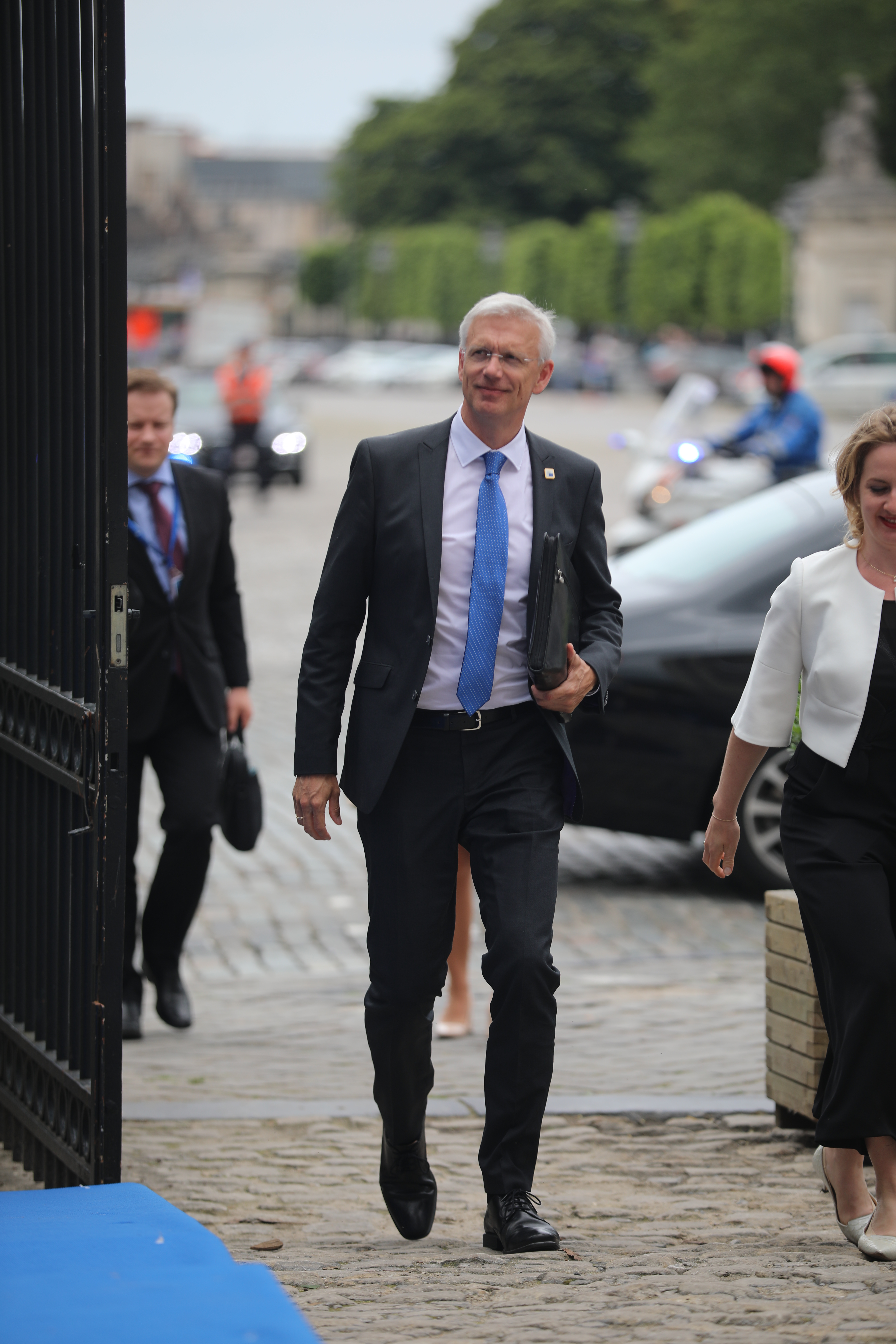 EPP Summit, 20 June 2019 Brussels